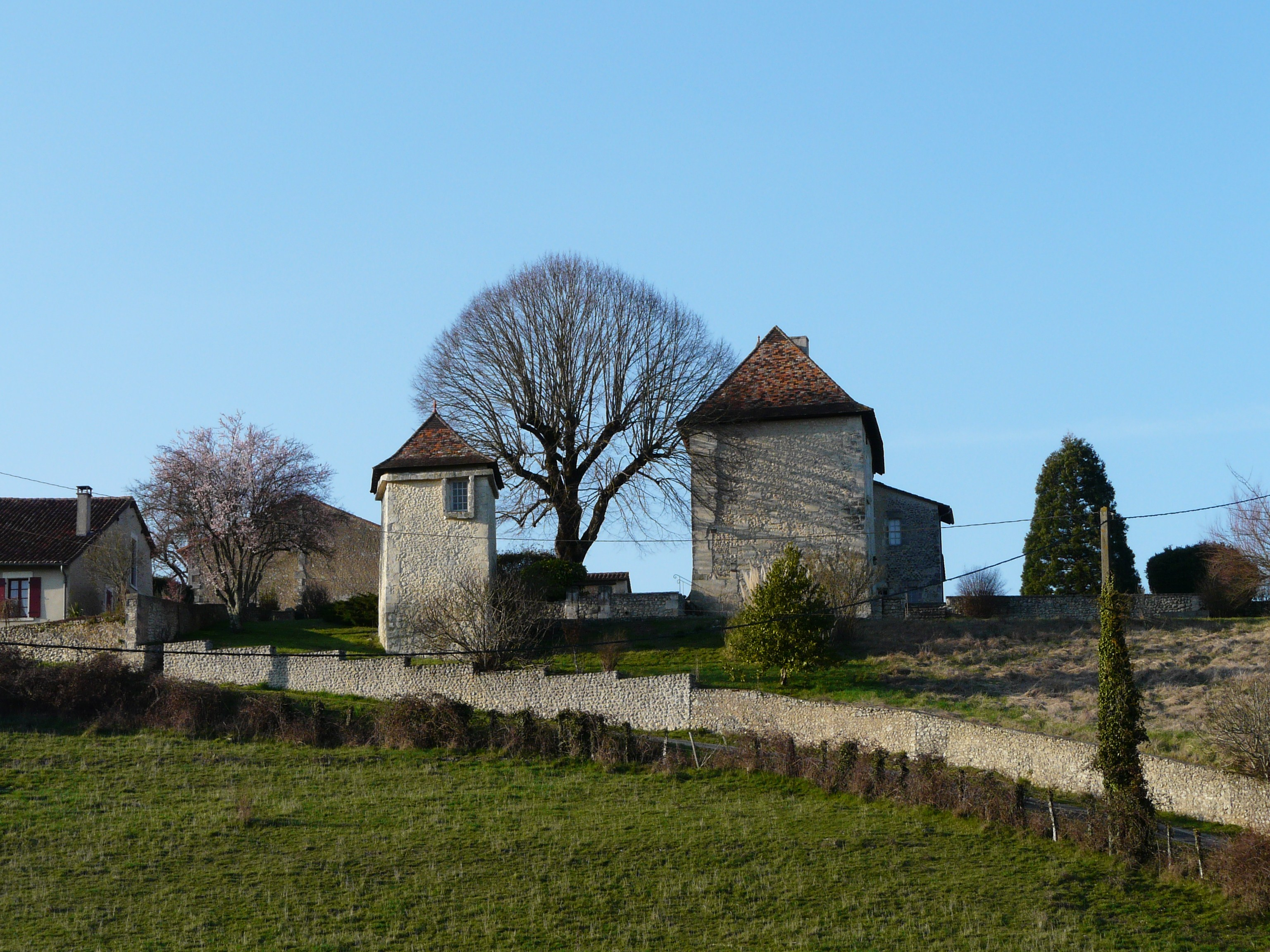 Le manoir de la Beauvière (et son pigeonnier sur la gauche) vu du sud, Ribérac, Dordogne, France.